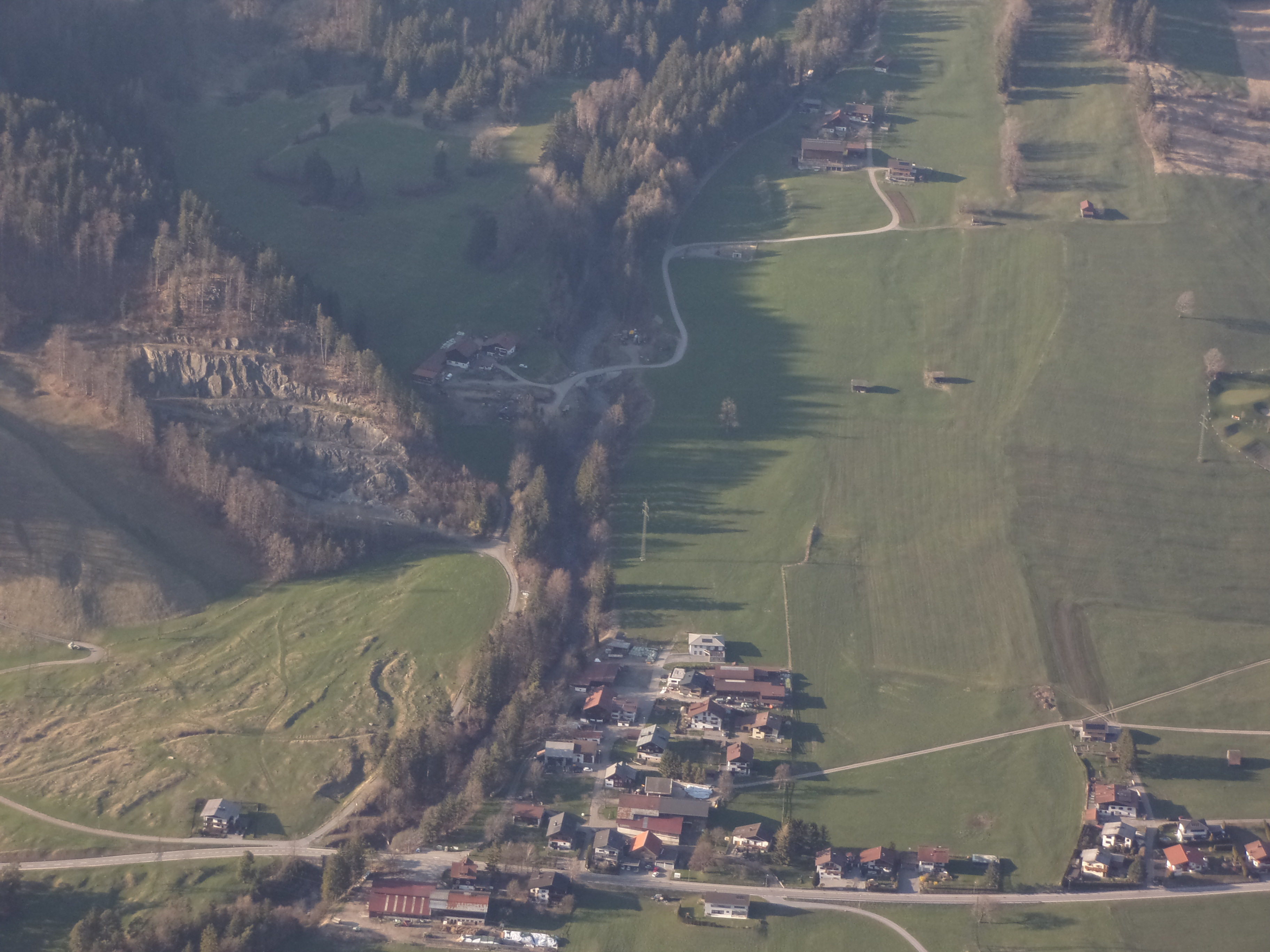 Oberradin vom Davennakopf, links daneben das Grubser Tobel und links des Tobels ein Haus von St. Leonhard